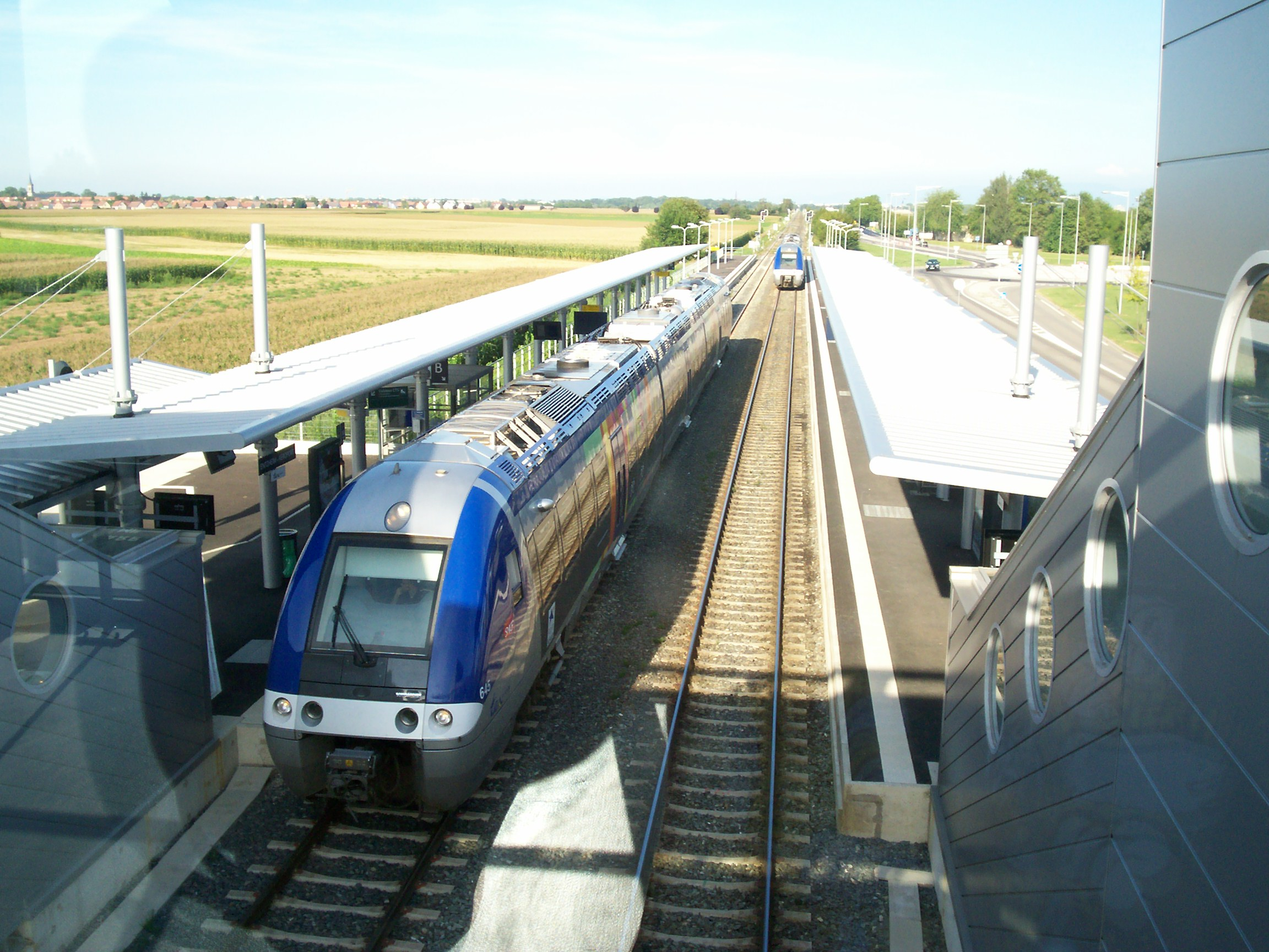 X 76500 TER Alsace